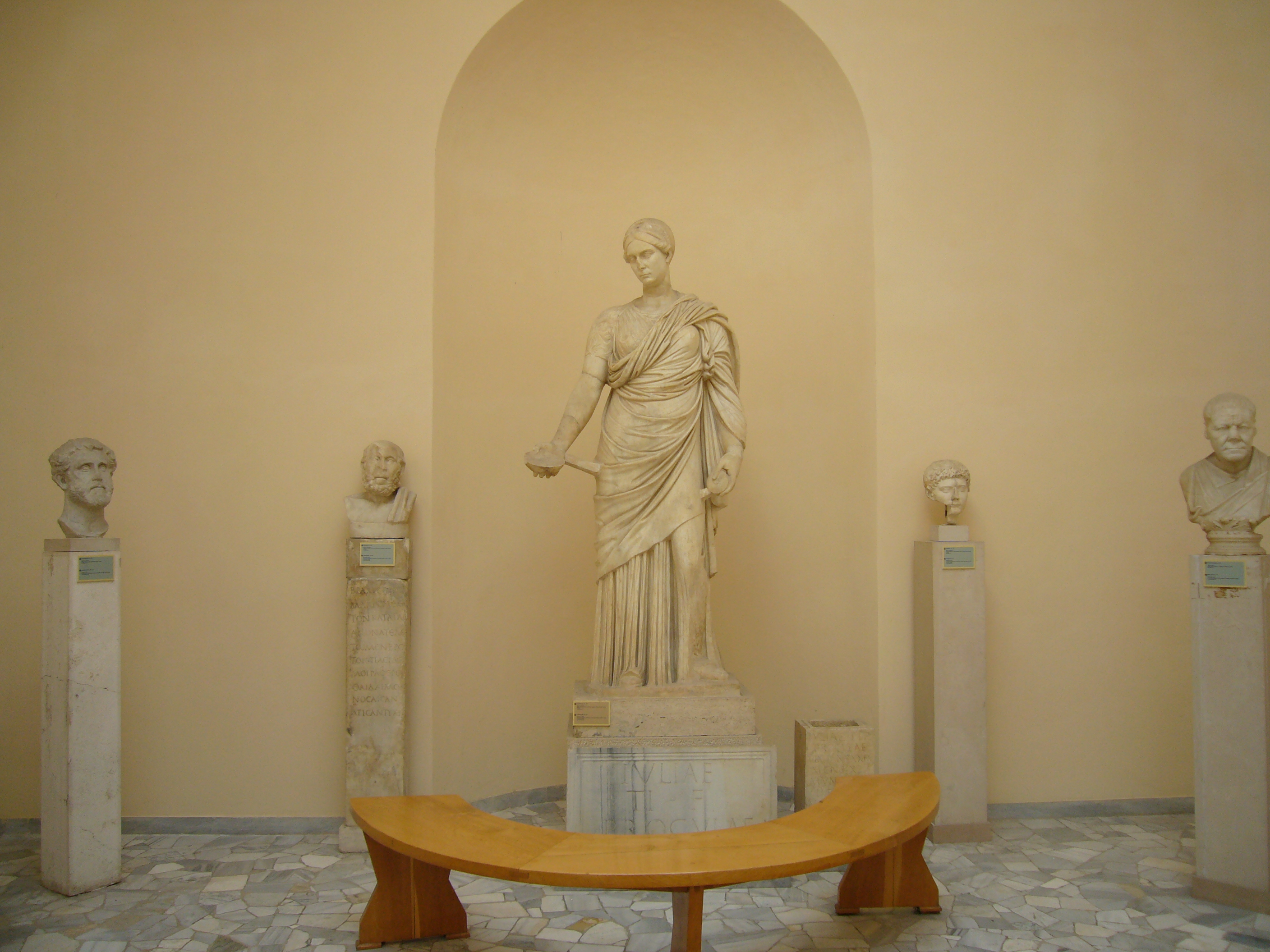 Ostia Antica, Museo Ostiense